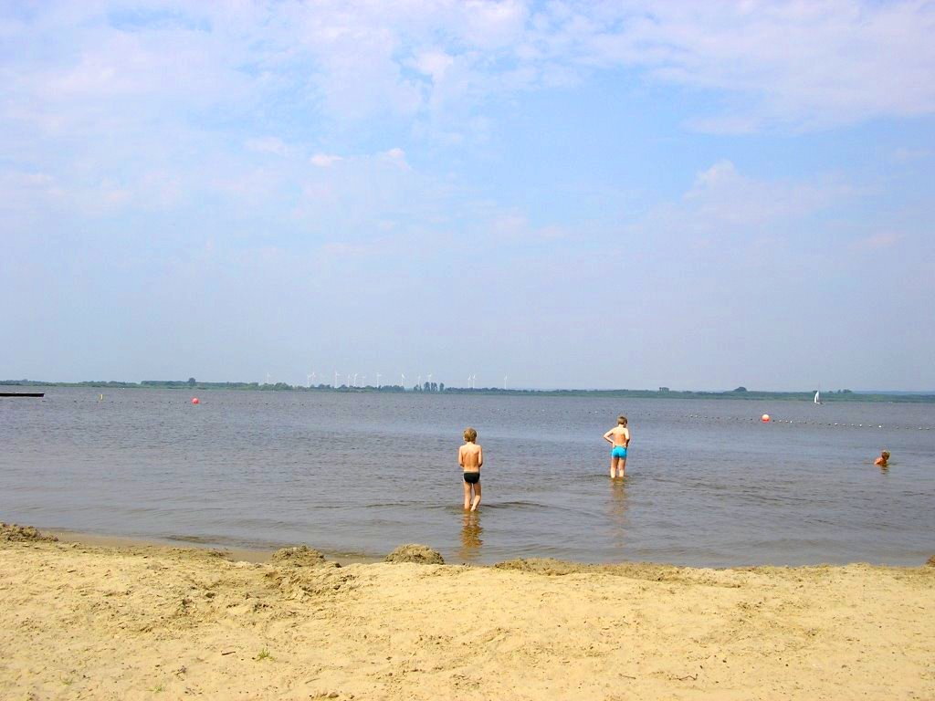 Strandszene am Dümmer bei Hüde